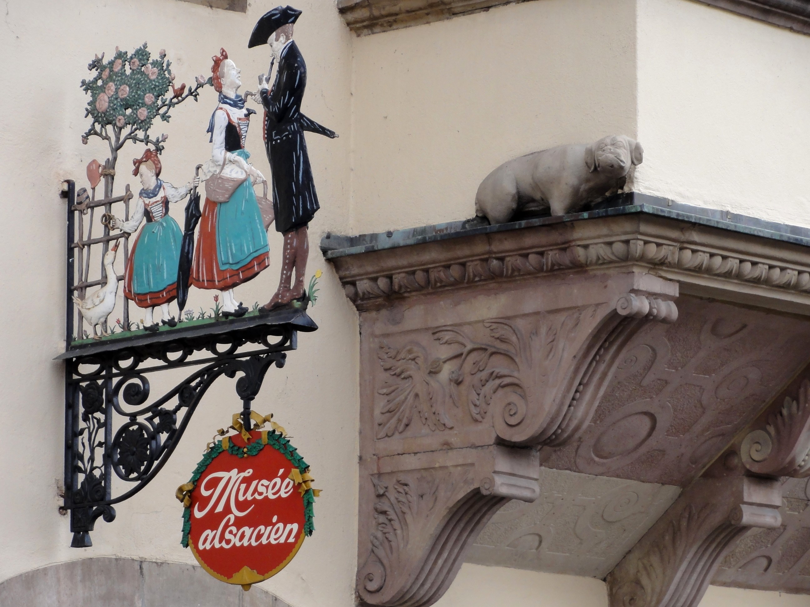 Alsace, Bas-Rhin, Strasbourg, Musée alsacien (XVIIe-XVIIIe), 23-24 quai Saint-Nicolas. It is indexed in the Base Mérimée, a database of architectural heritage maintained by the French Ministry of Culture, under the references PA00085182 and PA00085169 .